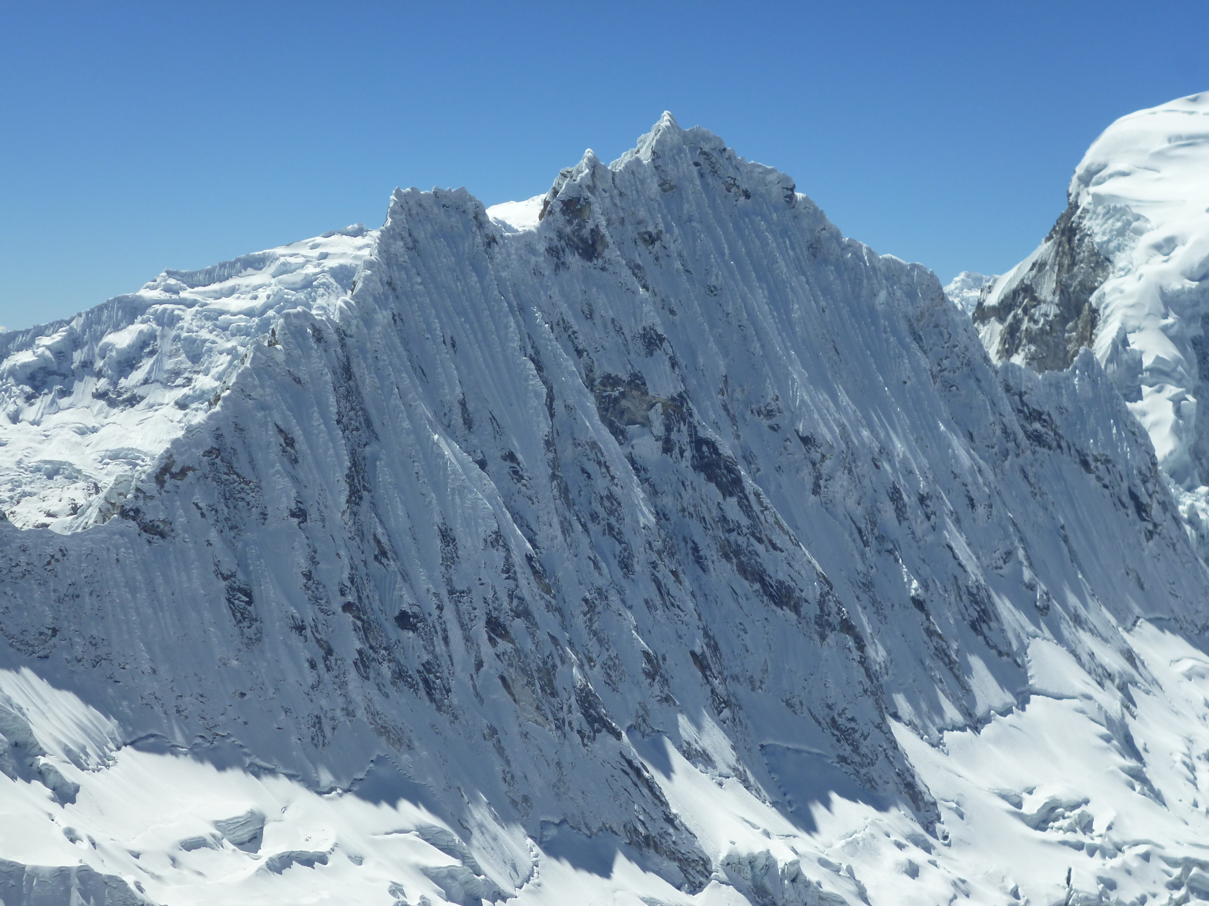 Foto tomada en julio del 2012, Cordillera Blanca, Áncash - Perú.